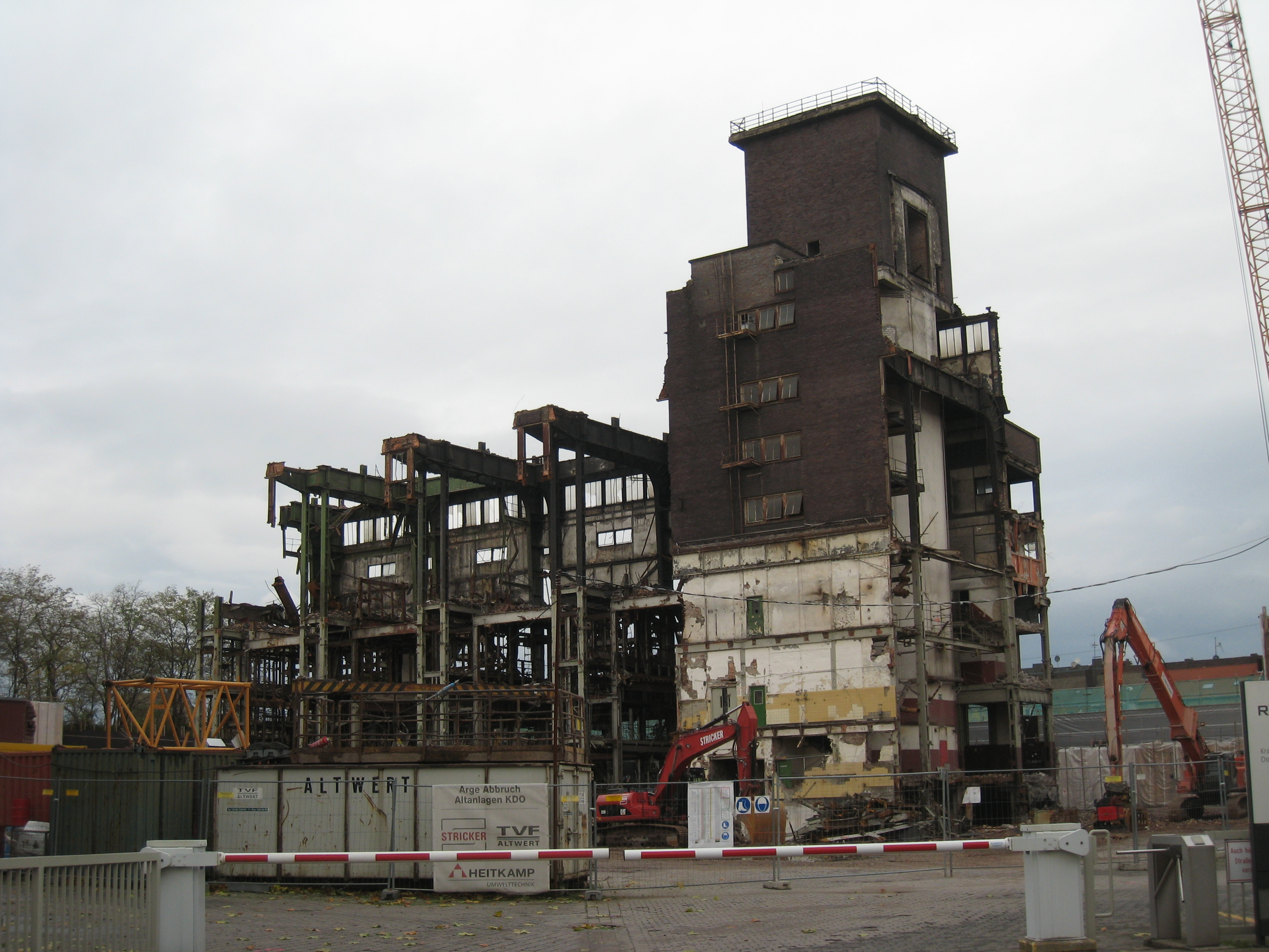 Demontage des Kraftwerks Dortmund 2010